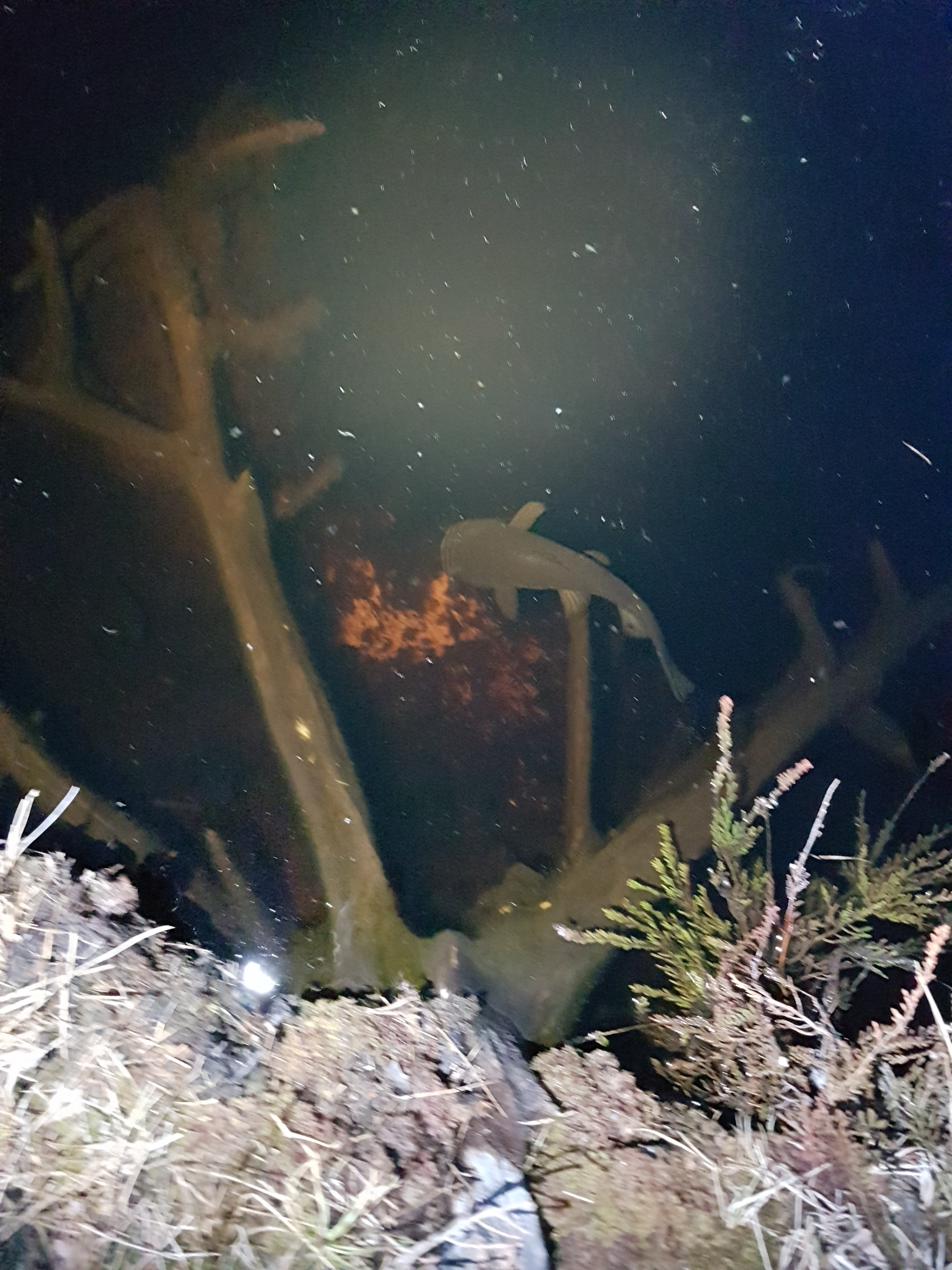 Malle observert i Vardetjern